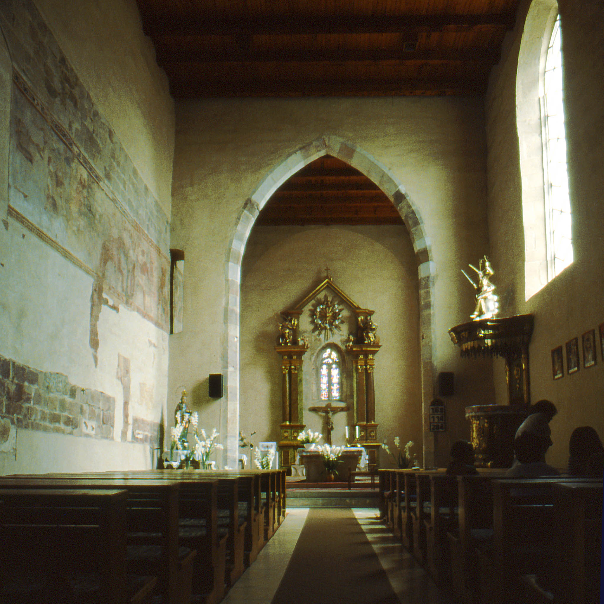 A tereskei római katolikus templom belül (Nógrád megye, Magyarország)